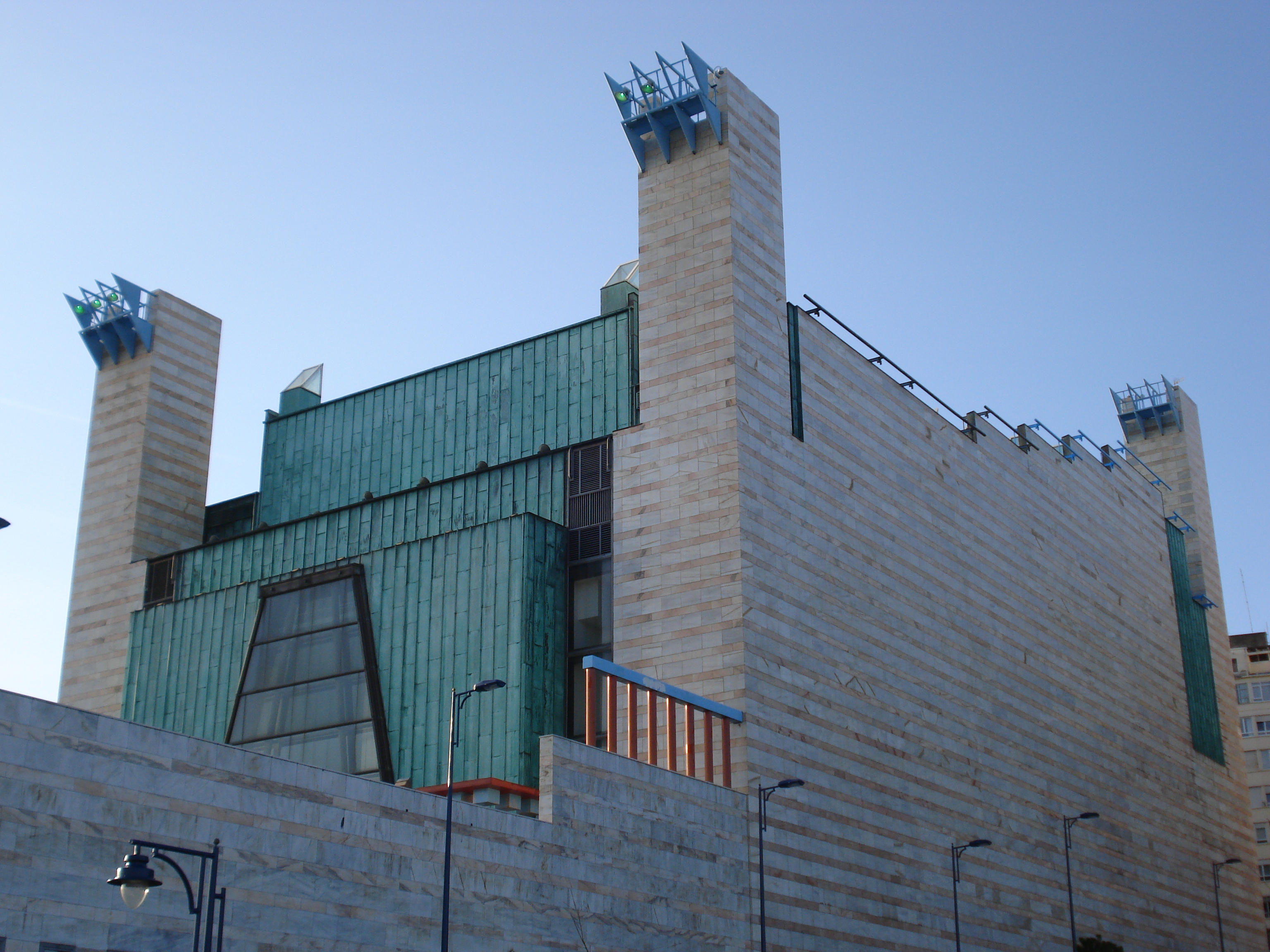 Palacio de Festivales de Cantabria (Santander, España).